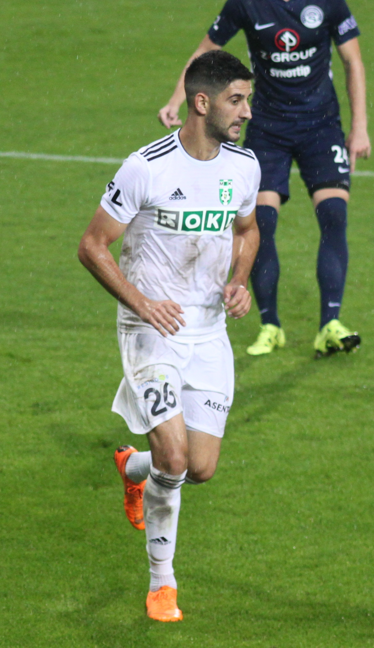 Bojan Letić při domácím provligovém zápase MSK Karviná-1. FC Slovácko